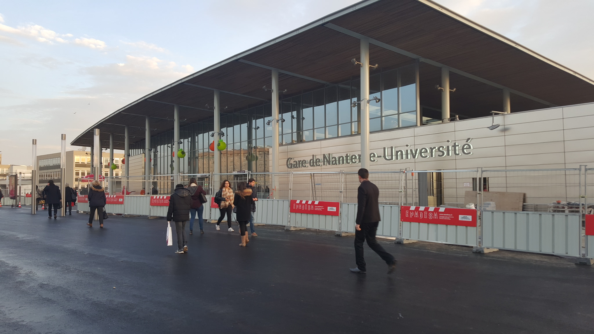 Gare de Nanterre-Université en 2015.